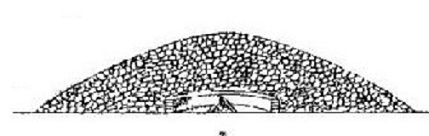 Coupe du tumulus de Coat-Penn-Goat en Saint-Goazec (dessin de Paul du Chatellier, publié dans "Exploration des tumulus des Montagnes Noires (Finistère)", revue "Bulletin archéologique du Comité des travaux historiques et scientifiques", 1901)